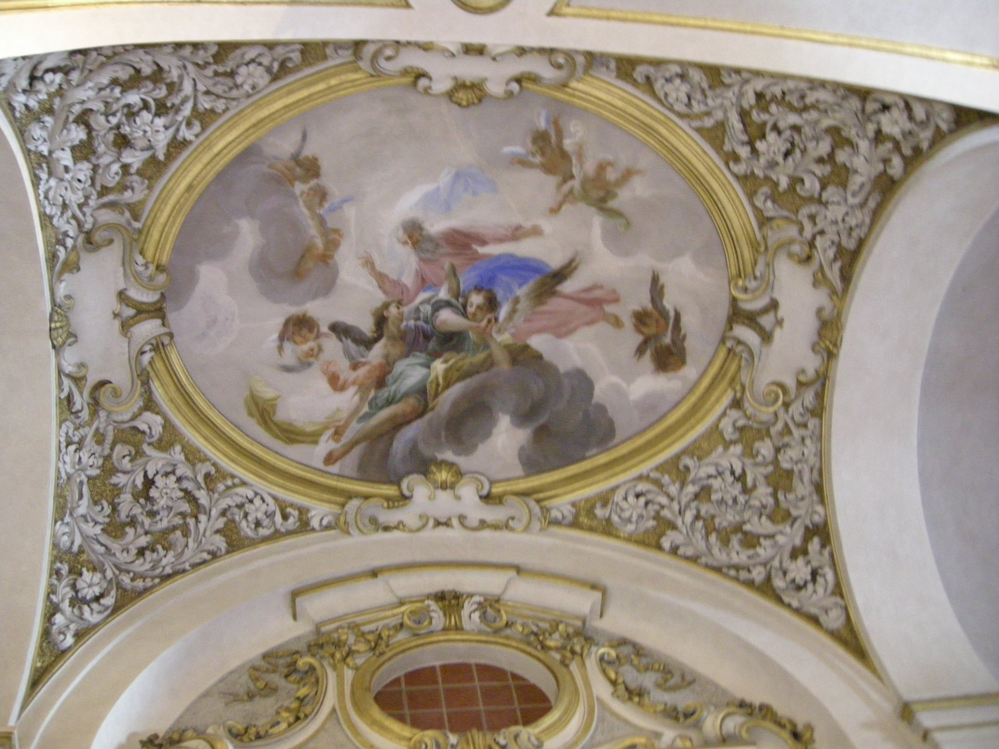 altare sx 2 ranieri del pace, l'eterno e angeli